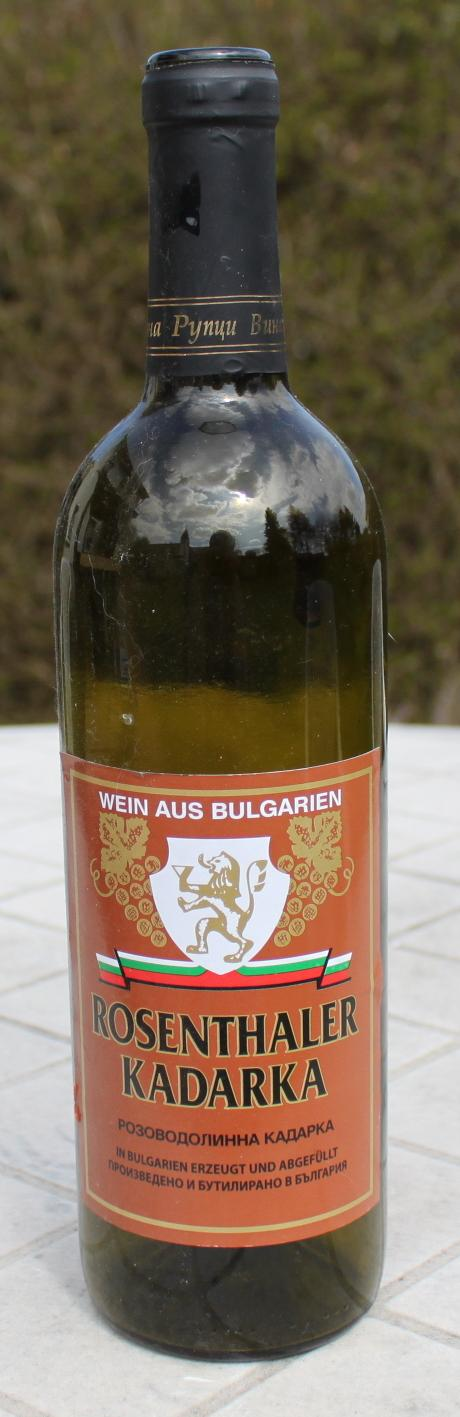 Flasche "Plavac", 0,75 Liter, trockener Rotwein Hergestellt und abgefüllt von "Vinarna Ruptsi", Sofia Einsprachige Beschriftung für Inlandsverbrauch in Deutschlnad